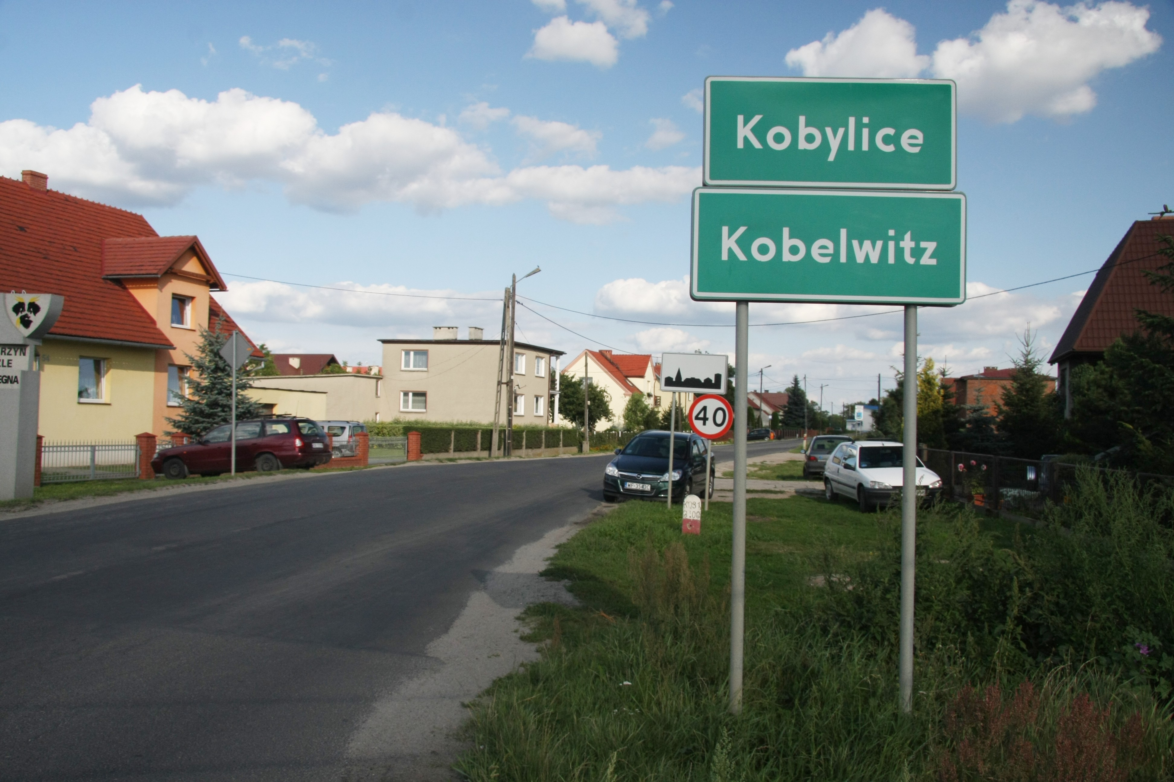 Dwujęzyczna tablica z nazwą przed wjazdem do Kobylic